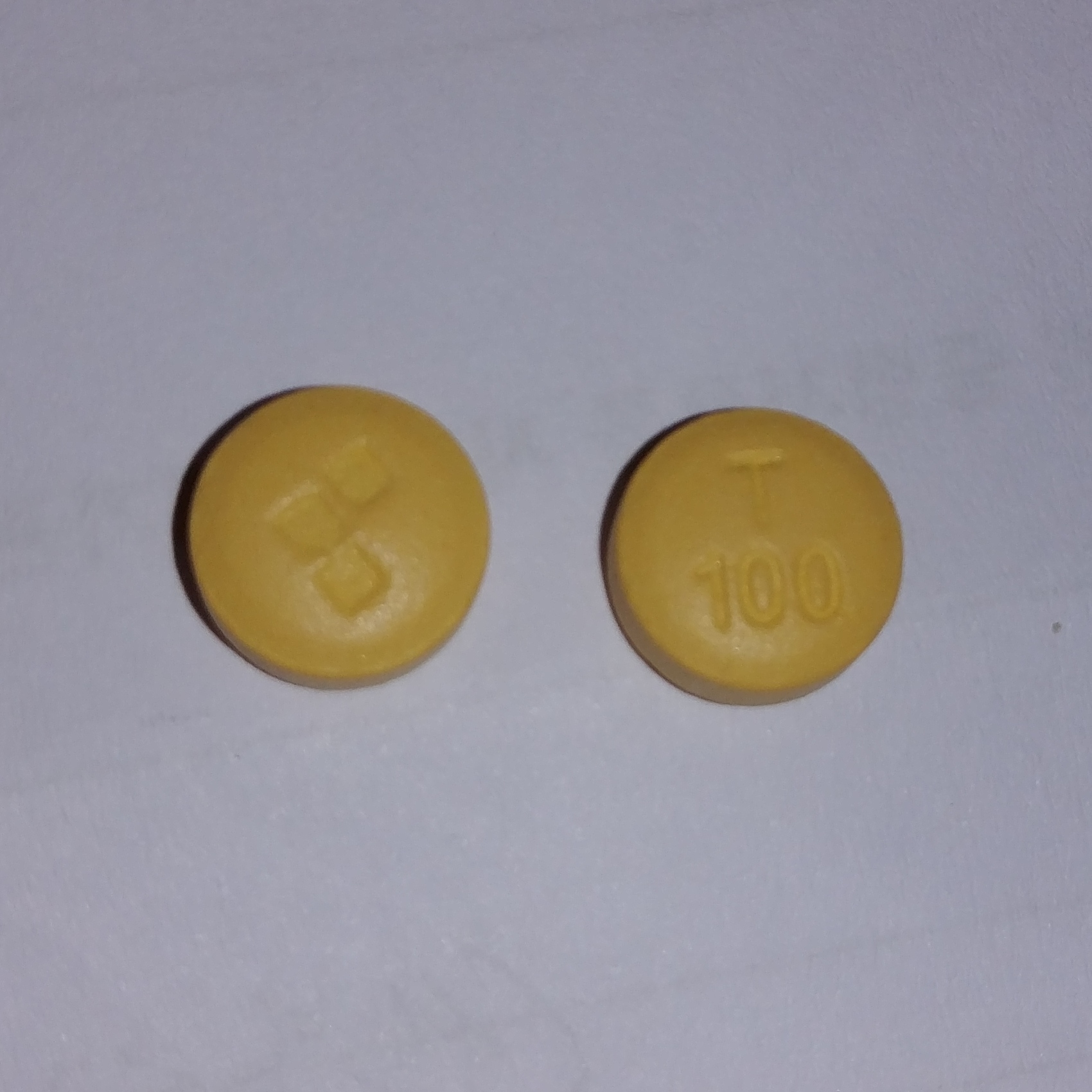 토파메이트 100mg (광범위 뇌전증 치료제 토파맥스 제네릭 - 명인제약)